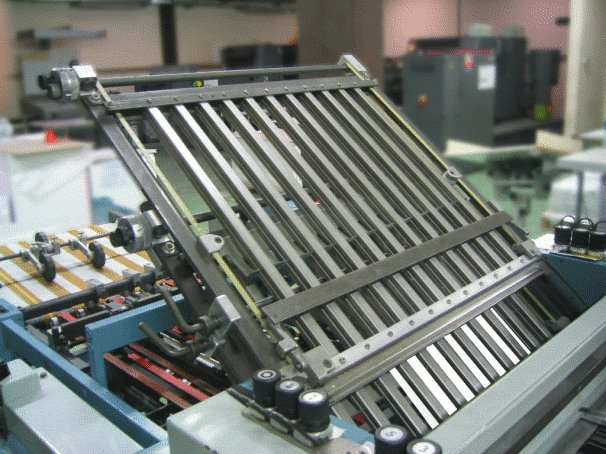 Photo B. Riboud - plieuse à poches :licence GFDL